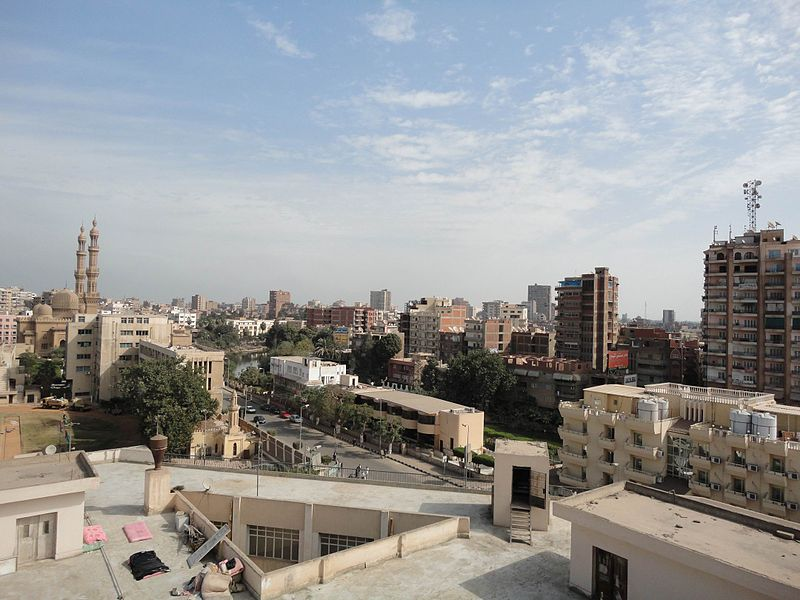 az zagazig dall'alto